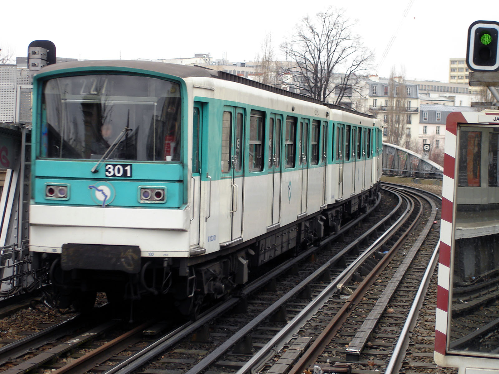 Station Jaurès de la ligne 2 du métro de Paris, France.